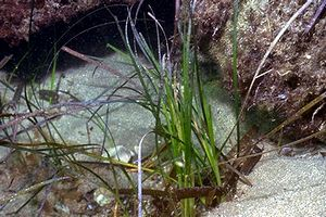 Fascio isolato di Posidonia oceanica